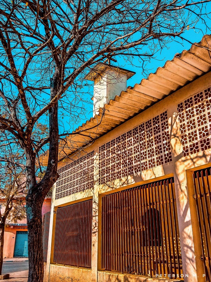 Uma das capelas mais antigas do bairro Ponte Alta.